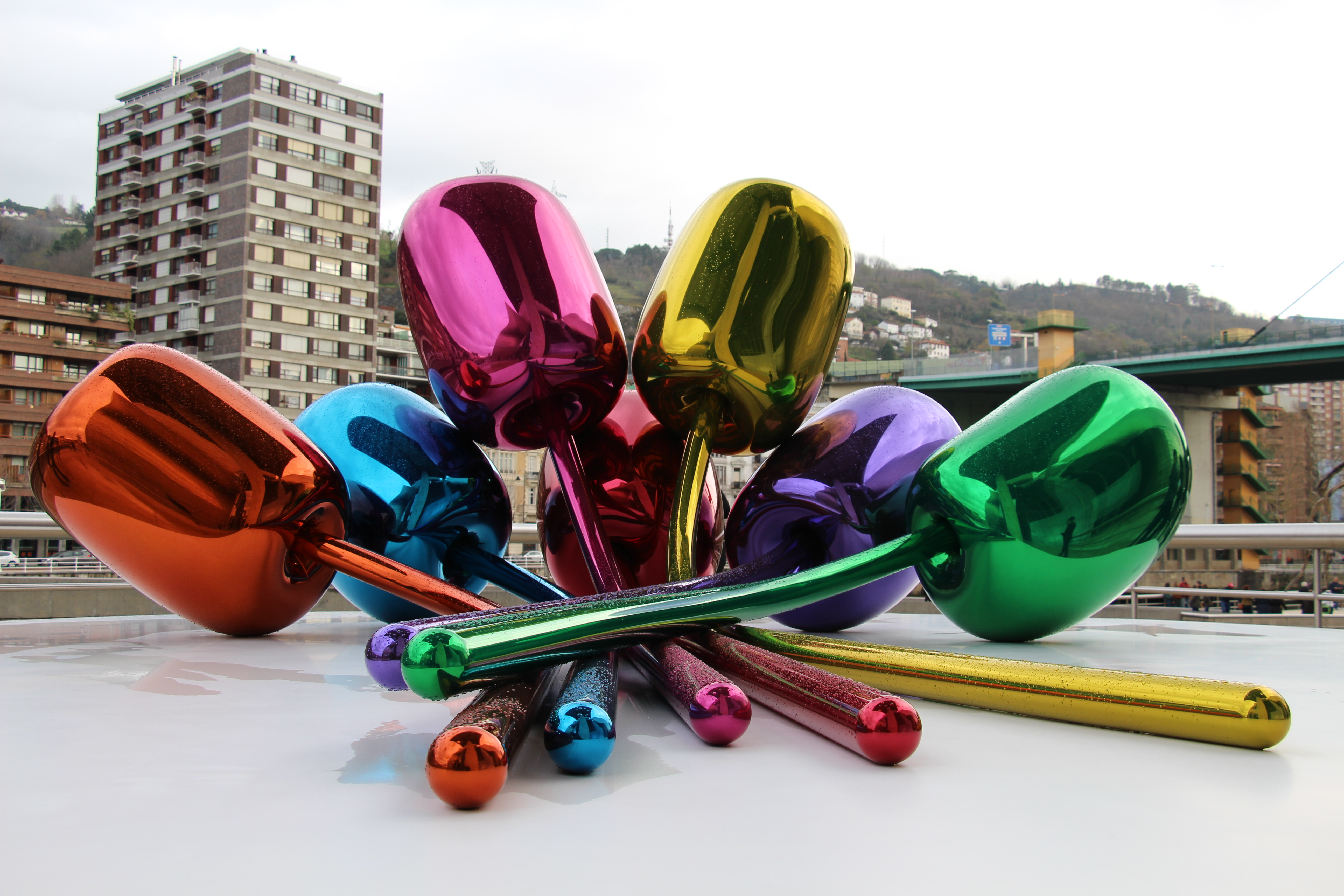 (Abando) Abandoibarra Etorbidea Guggenheim Bilbao Museum. Arch. Frank Gehry 1993-97. "Tulipanes", Jeff Koons, 1995-2004.